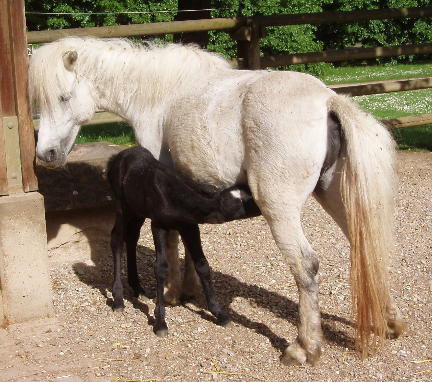 Ponyfohlen am ersten Lebenstag